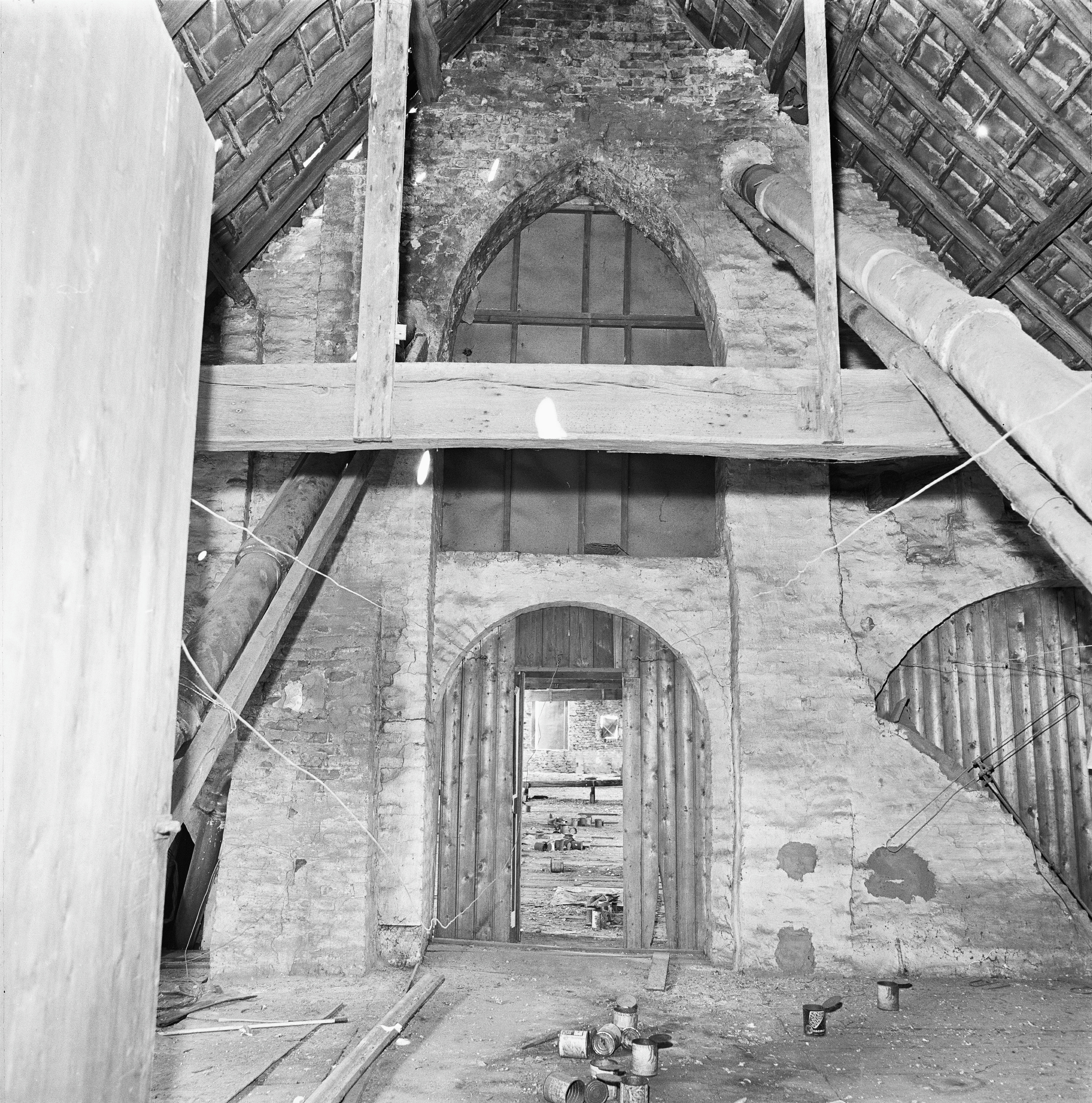 Voormalig Beggardenklooster: gedeelte zolder